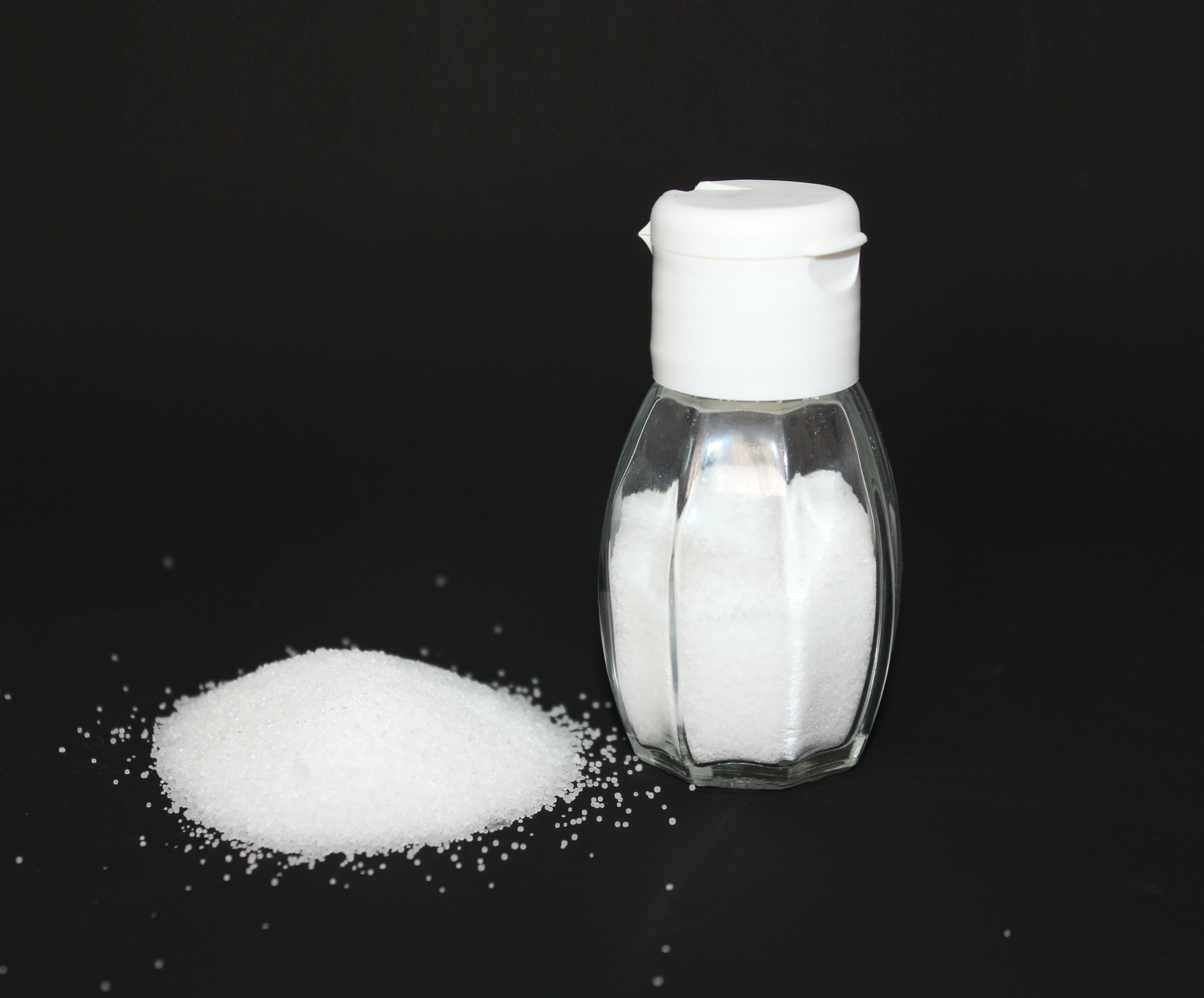 Table salt with salt shaker